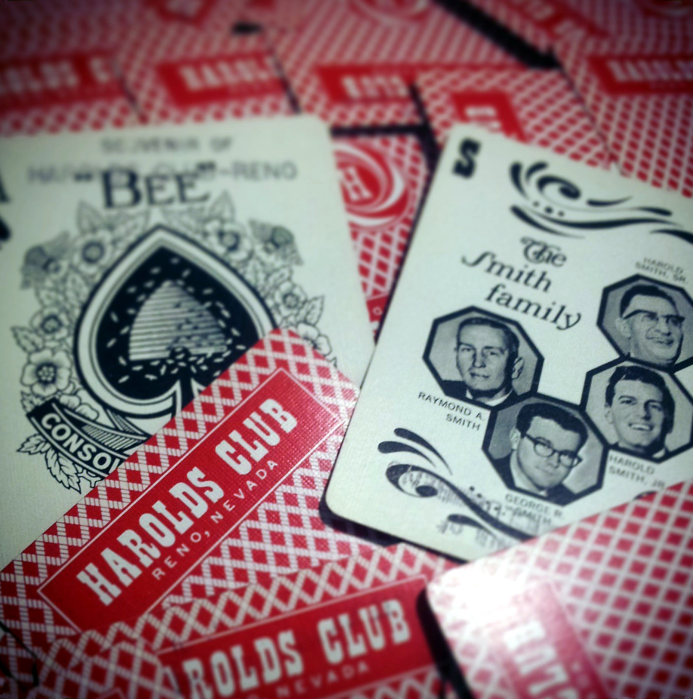 Barajas Bee del Harold's Club (1935 - 1995) de Reno Nevada - (2014)